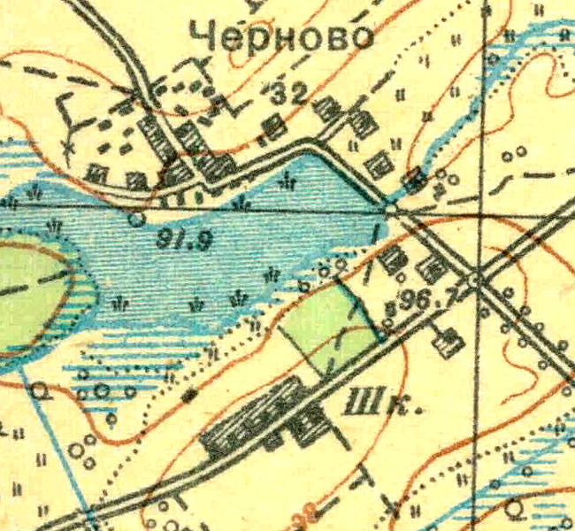 Топографическая карта Ленинградской области, квадрат О-35-24-Б-г (Б. Борницы), деревня Черново